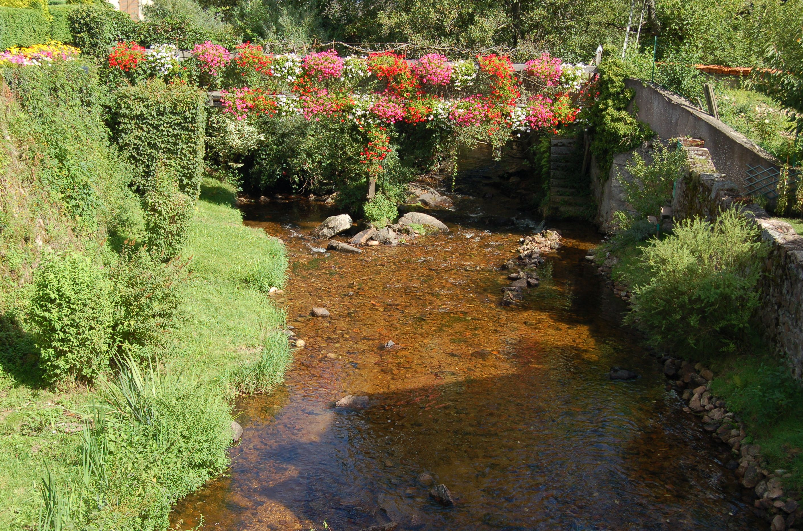 Rivière Barbenan: bourg d'Arfeuilles